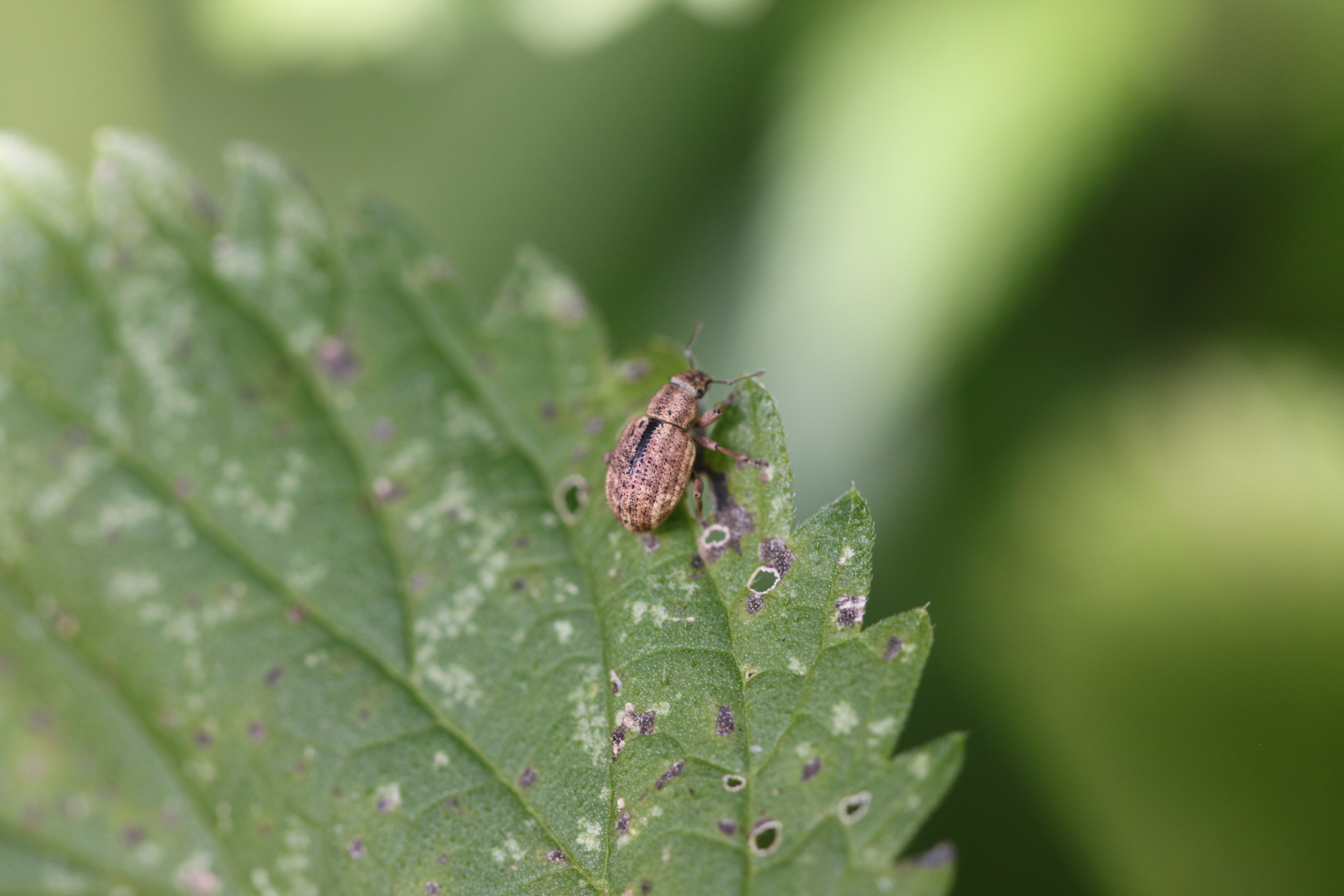 Schwarzfleckiger Kranzrüssler (Strophosoma melanogrammum) im Pfälzerwald